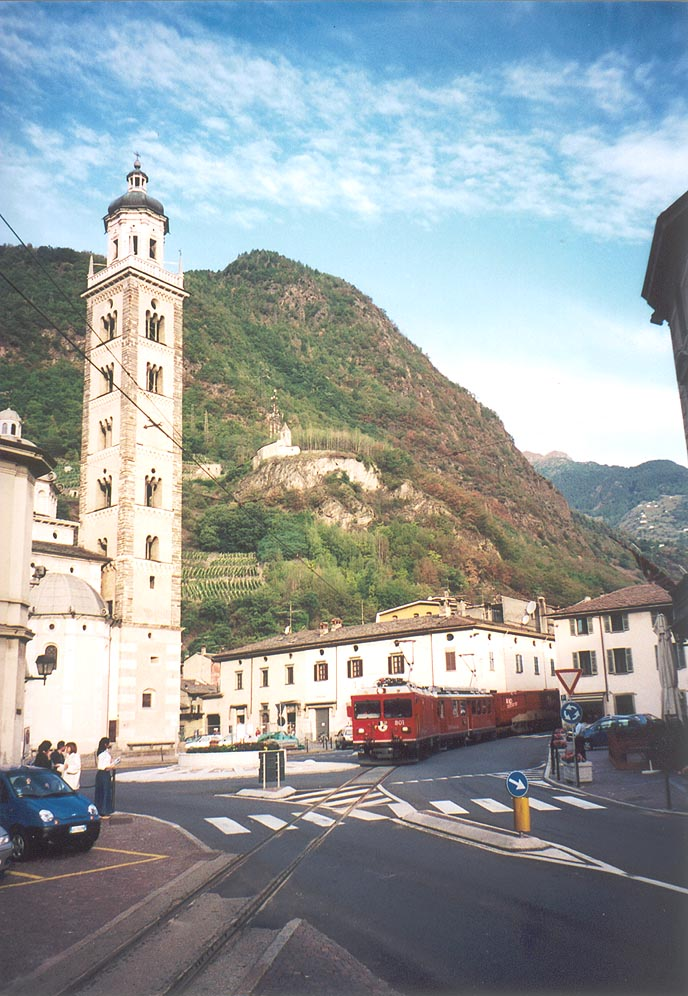 Tirano. V italském Tiranu se jezdí ulicemi města a přes náměstí. V čele dvouzdrojový vůz (energie z trolejového vedení nebo z dieselelektrického soustrojí).